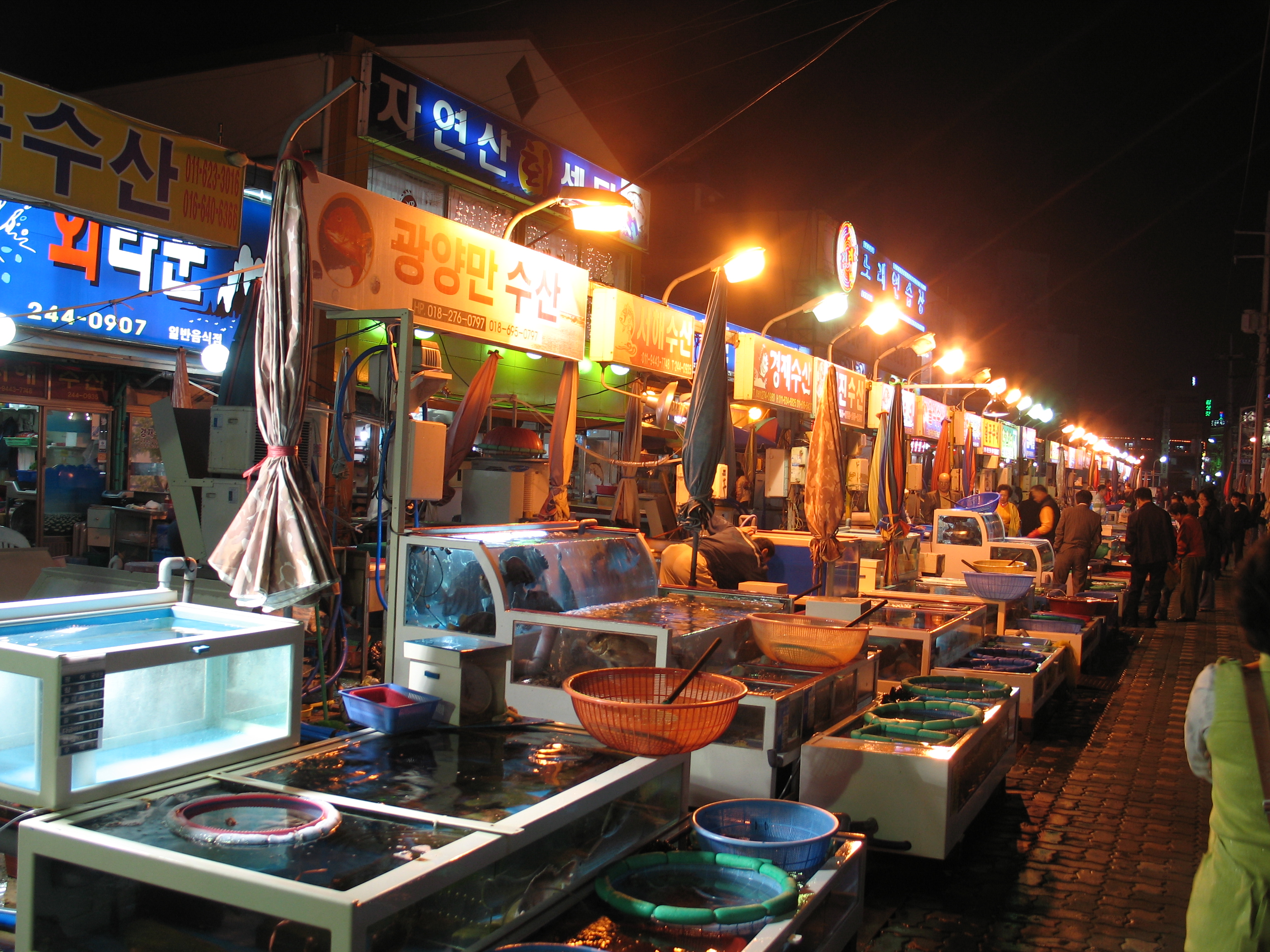 전라남도 목포 북항의 회 음식점 밀집지역(일명 북항회센터).